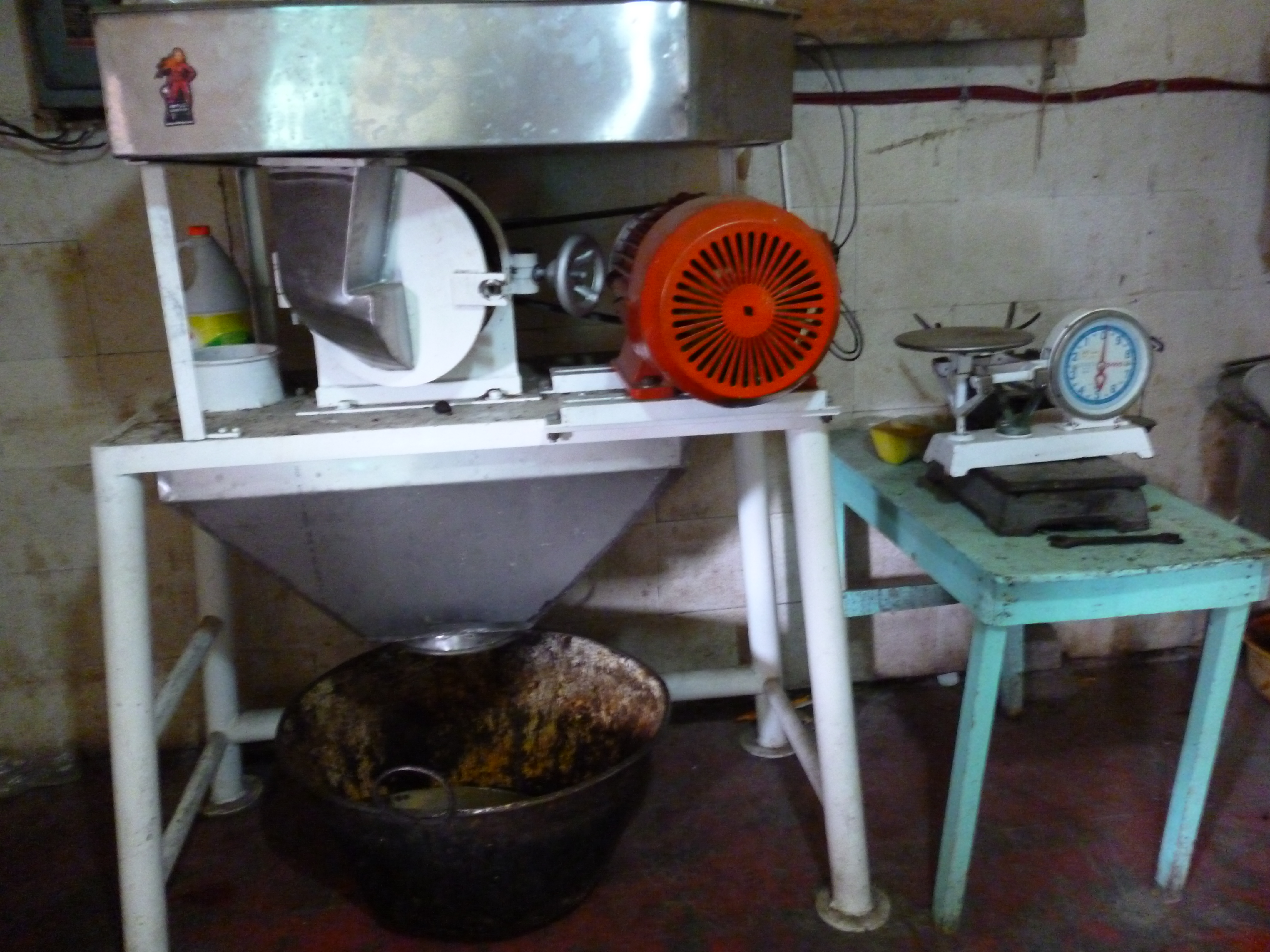 Molino para la creación de mole en la calle Guadalupe Victoria, en San Pedro Atocpan, Distrito Federal, México